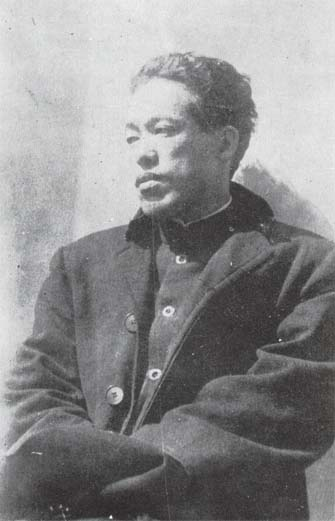 a Japanese man 夢野久作(Yumeno Kyusaku)。大正10年（1921年）32歳、九州日報新聞記者時代